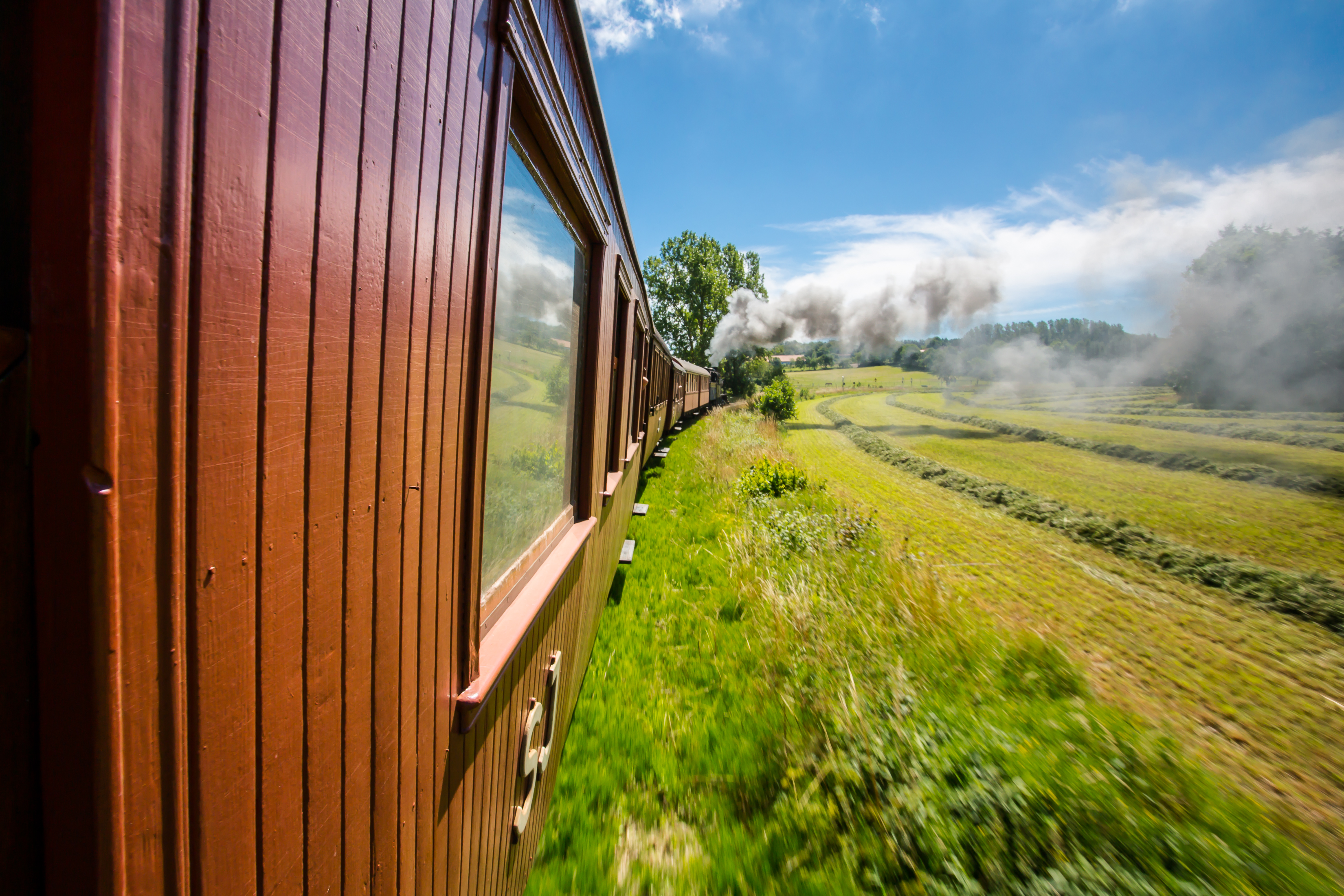 Skånska Järnvägar - Ångtåget på Österlen. Simrishamn, Brösarp